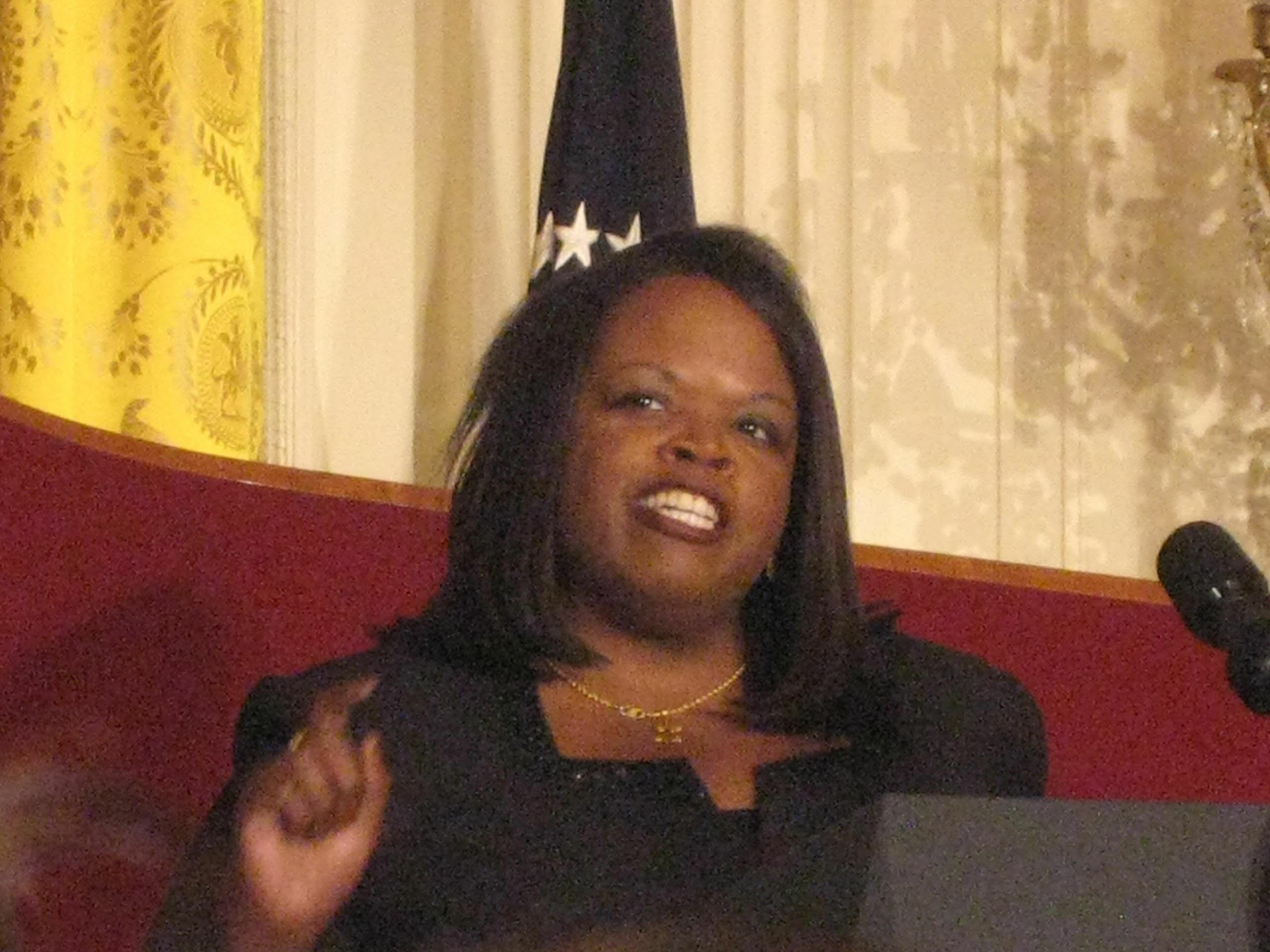 Rabbi Alysa Stanton